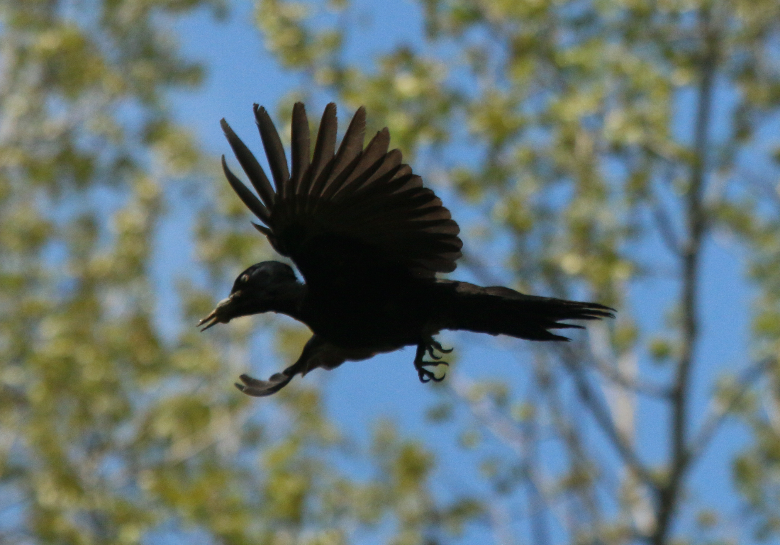 Национальный парк Таганай: Парк расположен в северной части Златоустовского и Кусинского районов Челябинской области. К южным границам парка примыкает участок Южно-Уральской железной дороги и автодорога Златоуст – Миасс. Территория национального парка включает в себя северную часть средне-высотных хребтов Южного Урала, представляющих собой обособленный горный узел, с трех сторон переходящий в плоскогорья и далее – в лесостепь. Протяженность территории национального парка с юга на север – 52 км, с запада на восток 10-15 км,Златоуст, Челябинская область This image is related to the protected area of Russia number 7400102